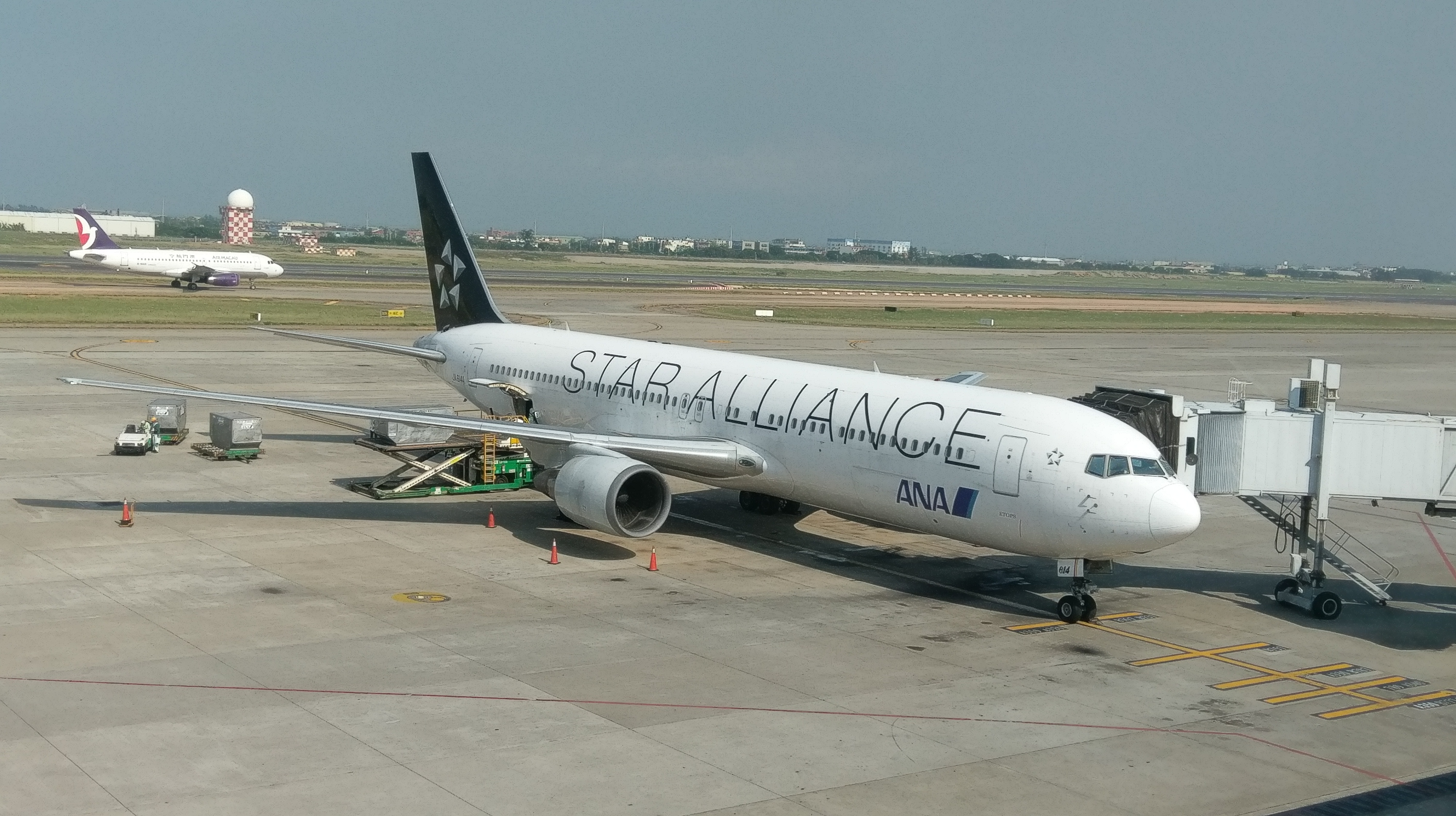 中文（台灣）: 全日空的波音767-381(ER)星空聯盟塗裝，攝於台灣桃園國際機場